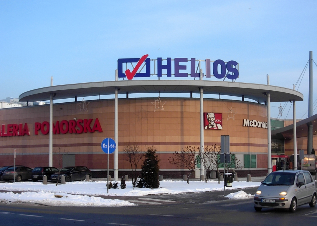 Kino Helios w Galerii Pomorskiej w Bydgoszczy